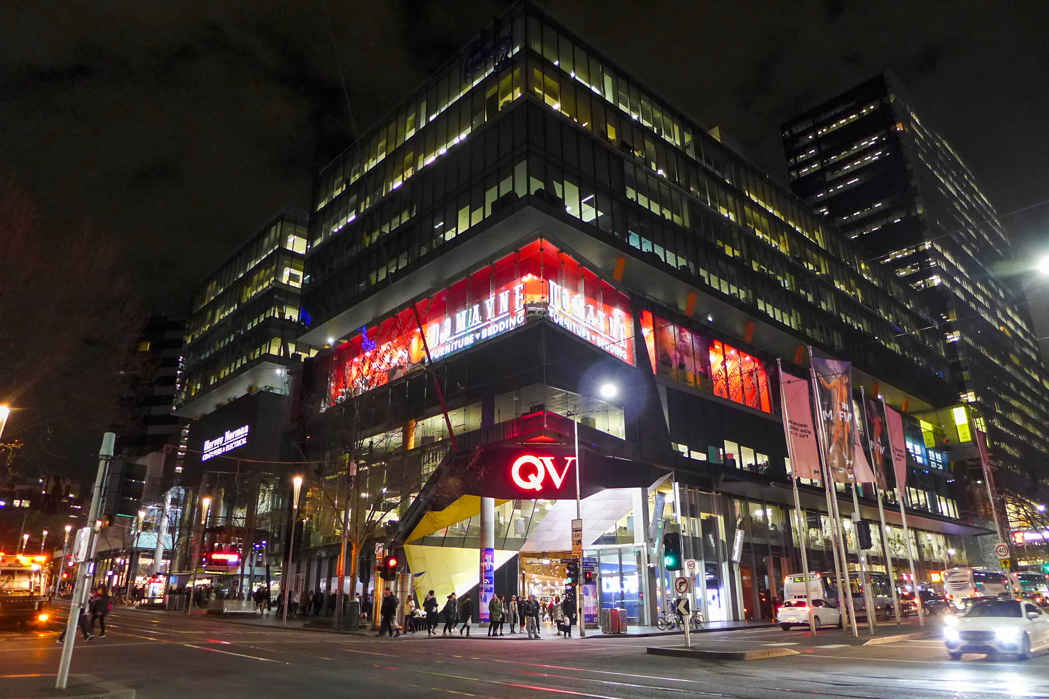 Queen Victoria Village